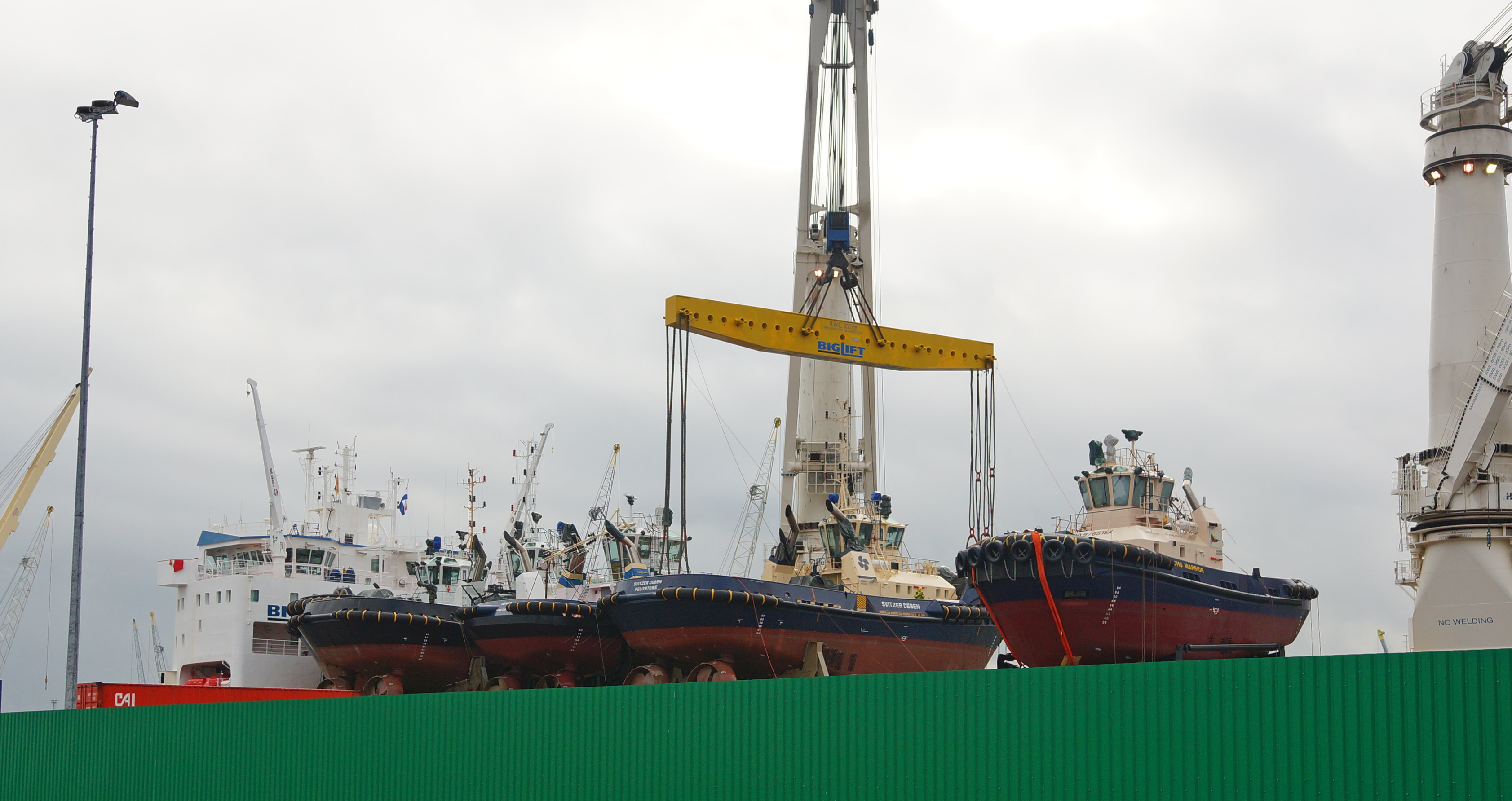 Waalhaven Rotterdam 22-10-2015